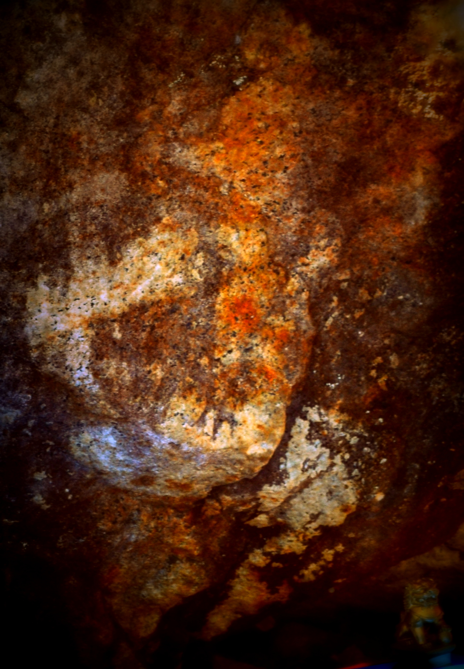 Богиня Янжима. Ярикто, Баргузинский район, Бурятия